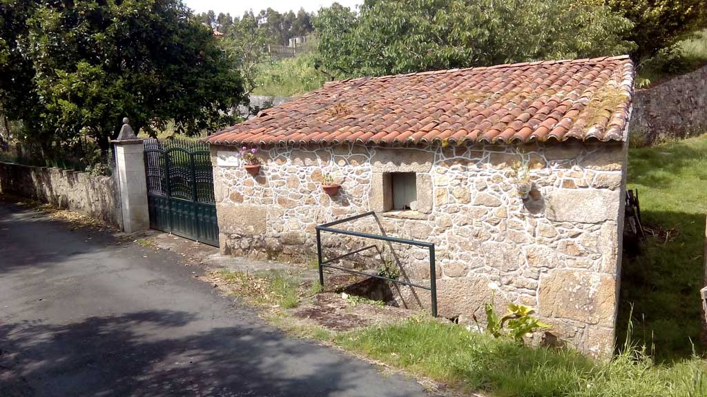 Vista do Muíño de Rioxunto, Esmelle.